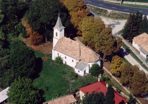 Bakonybánk Szent Bertalan római katolikus templom, Hungary, aerial photography